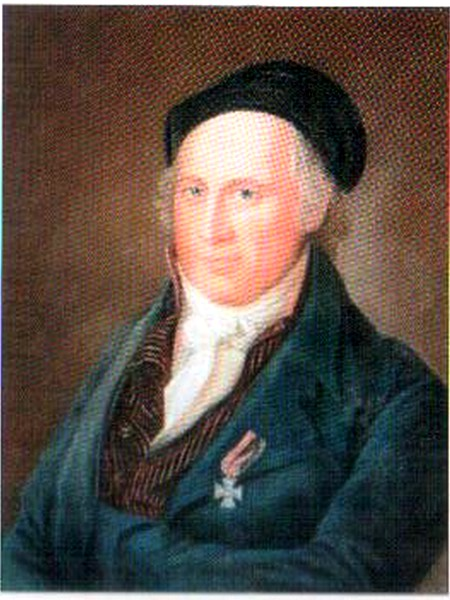 Portrét Franze Zachariase Römische od Dominika Kindermanna